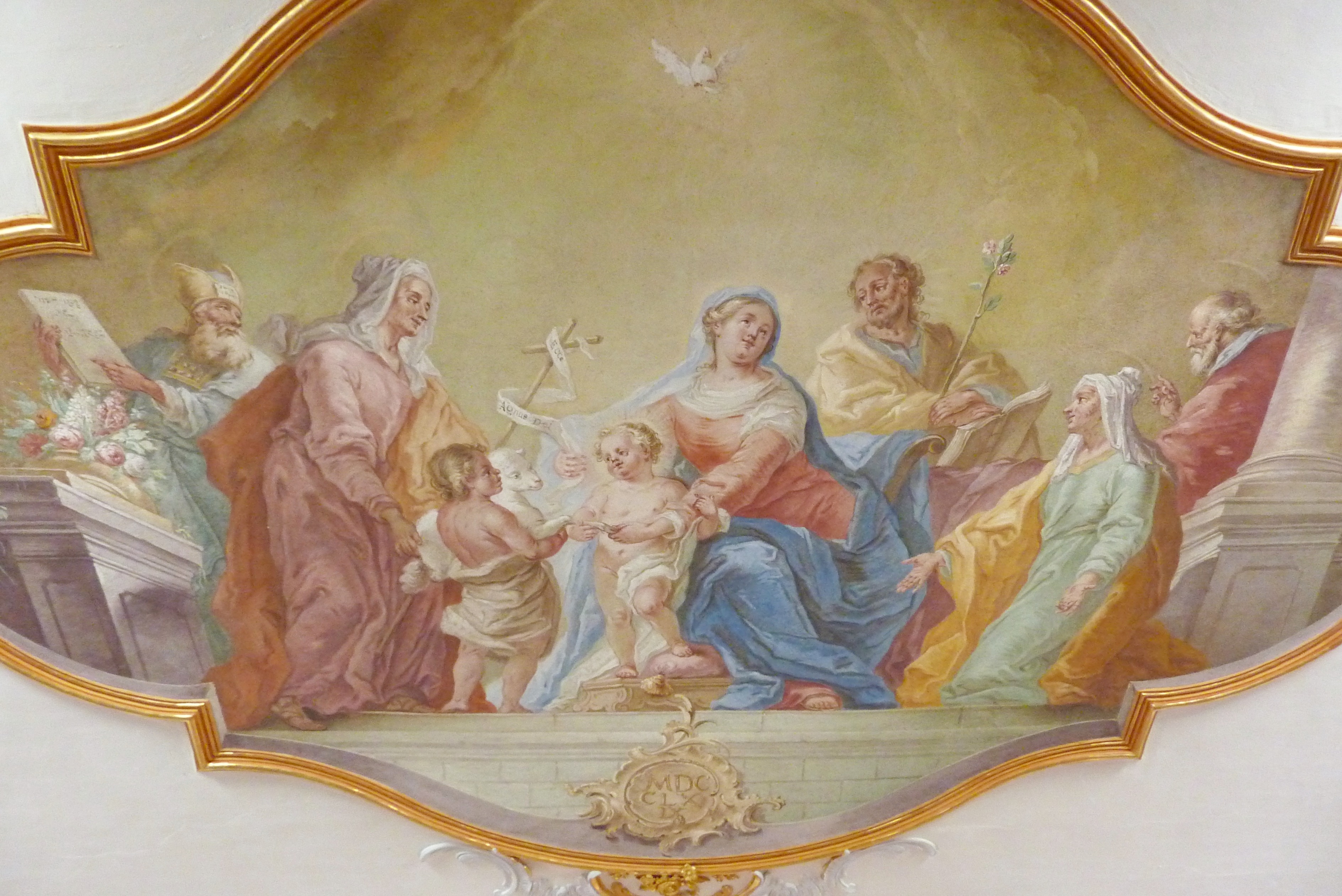 Katholische Wallfahrtskirche Mariä Himmelfahrt in Buggenhofen, einem Ortsteil von Bissingen im Landkreis Dillingen an der Donau (Bayern), Fresko unter der unteren Empore von Johann Baptist Enderle, von 1769, Darstellung: Heilige Sippe, Jahreszahl MDCCLXIX (1769)